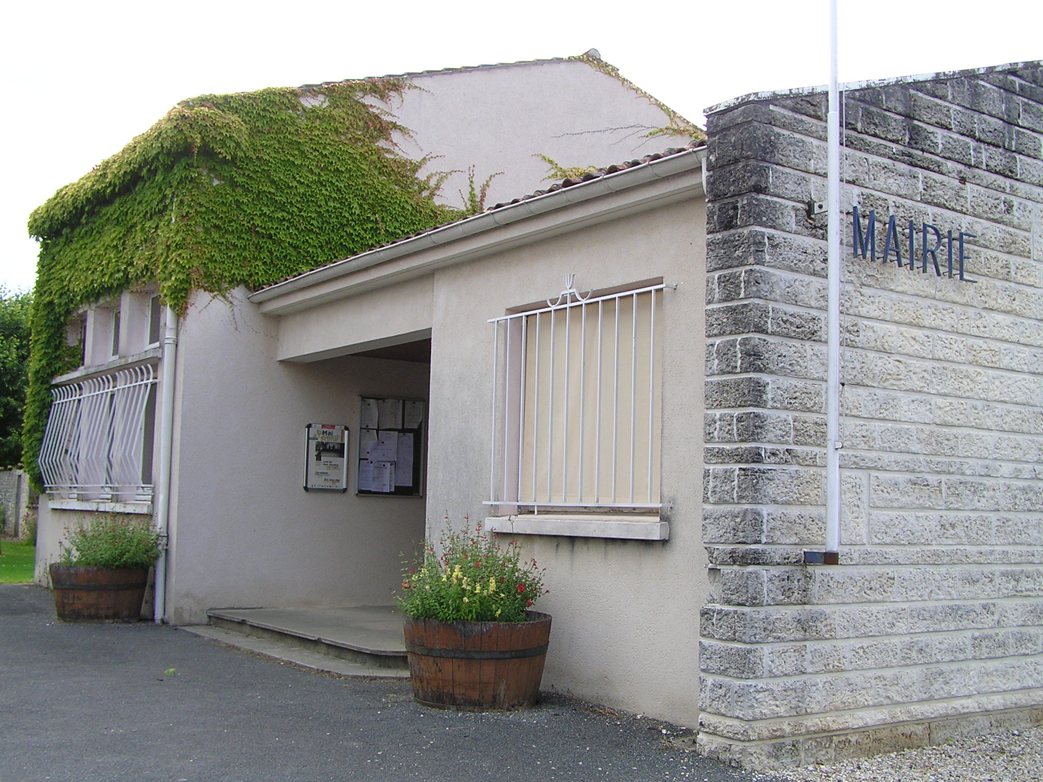 Mairie de Louzac-Saint-André